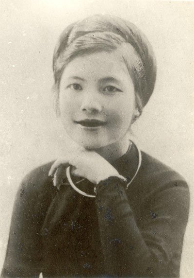 Chân dung bà Trịnh Thị Điền (鄭氏田, 1912 - 1996), phu nhân của nhà tư sản Đỗ Đình Thiện. Ảnh chụp tại Sài-gòn năm 1936.